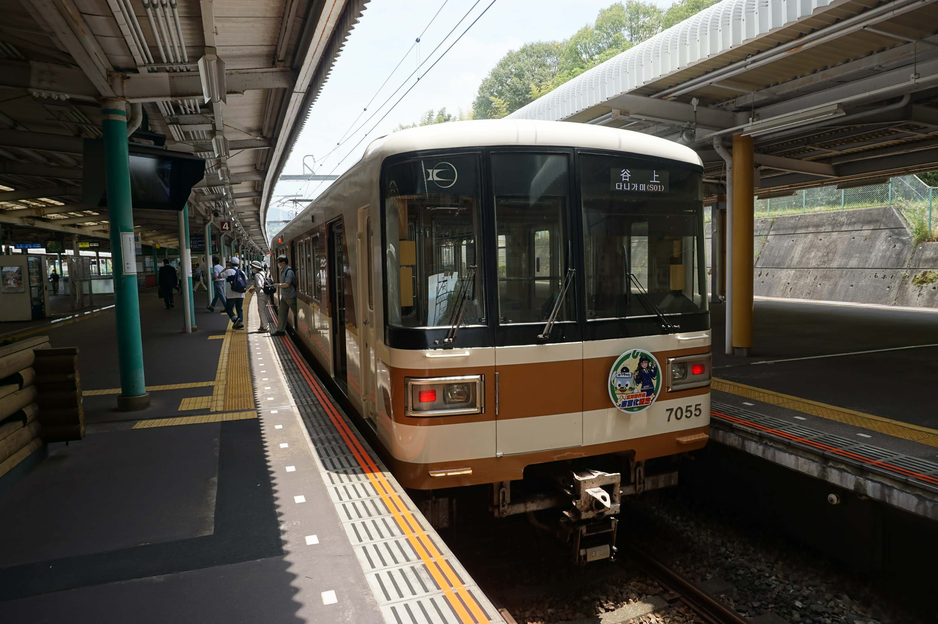 神戸市交通局移管後に撮影